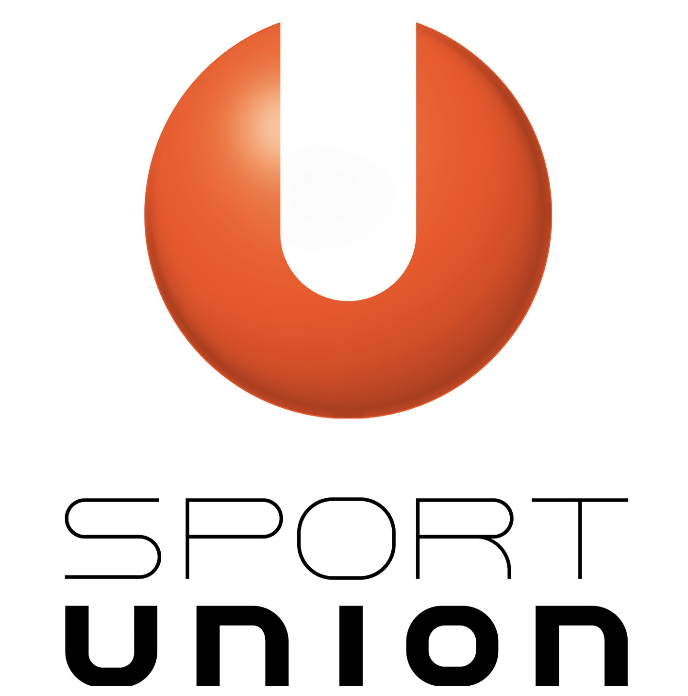 Logo der Sportunion. Diese ist einer der drei Sportdachverbände in Österreich mit 921.000 Mitgliedern in rund 4.370 Vereinen (Stand 1.1.2019)